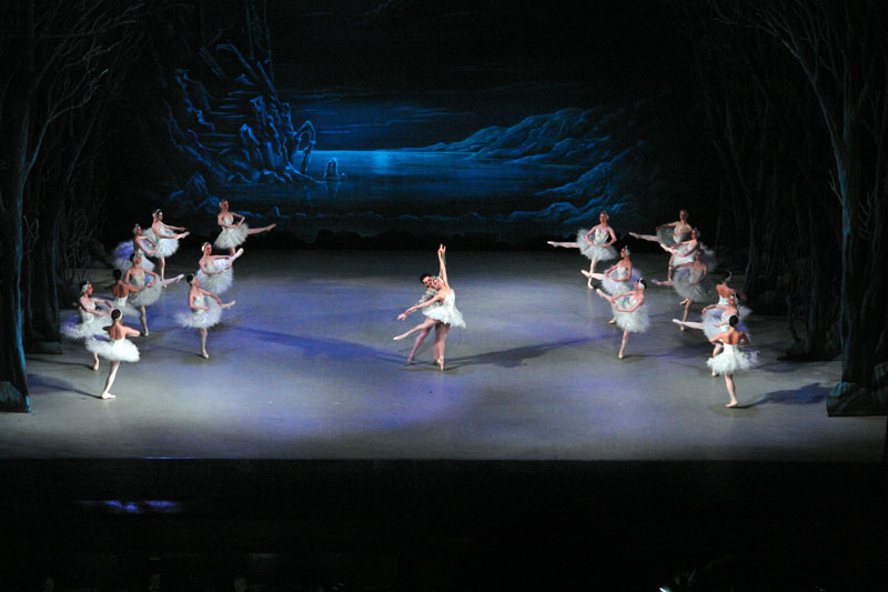 Nino Ananiashvili in Swan Lake ballet